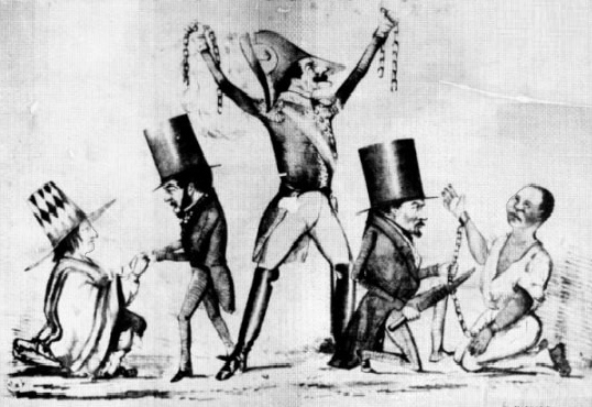 El 3 de diciembre de 1854 es abolida la esclavitud en el Perú por el presidente Ramón Castilla. Aunque durante la independencia, San Martín decreta la libertad de vientres, lo que quería decir que nadie nacía esclavo en el Perú; es hasta 31 años después que quedó abolida la esclavitud en Perú. Ramón Castilla, militar y presidente del Perú, decretó la libertad para los esclavos negros, el 3 de diciembre de 1854, en Huancayo, durante un periodo de gobierno provisional durante la época de guerra civil que libraba contra José Rufino Echenique.